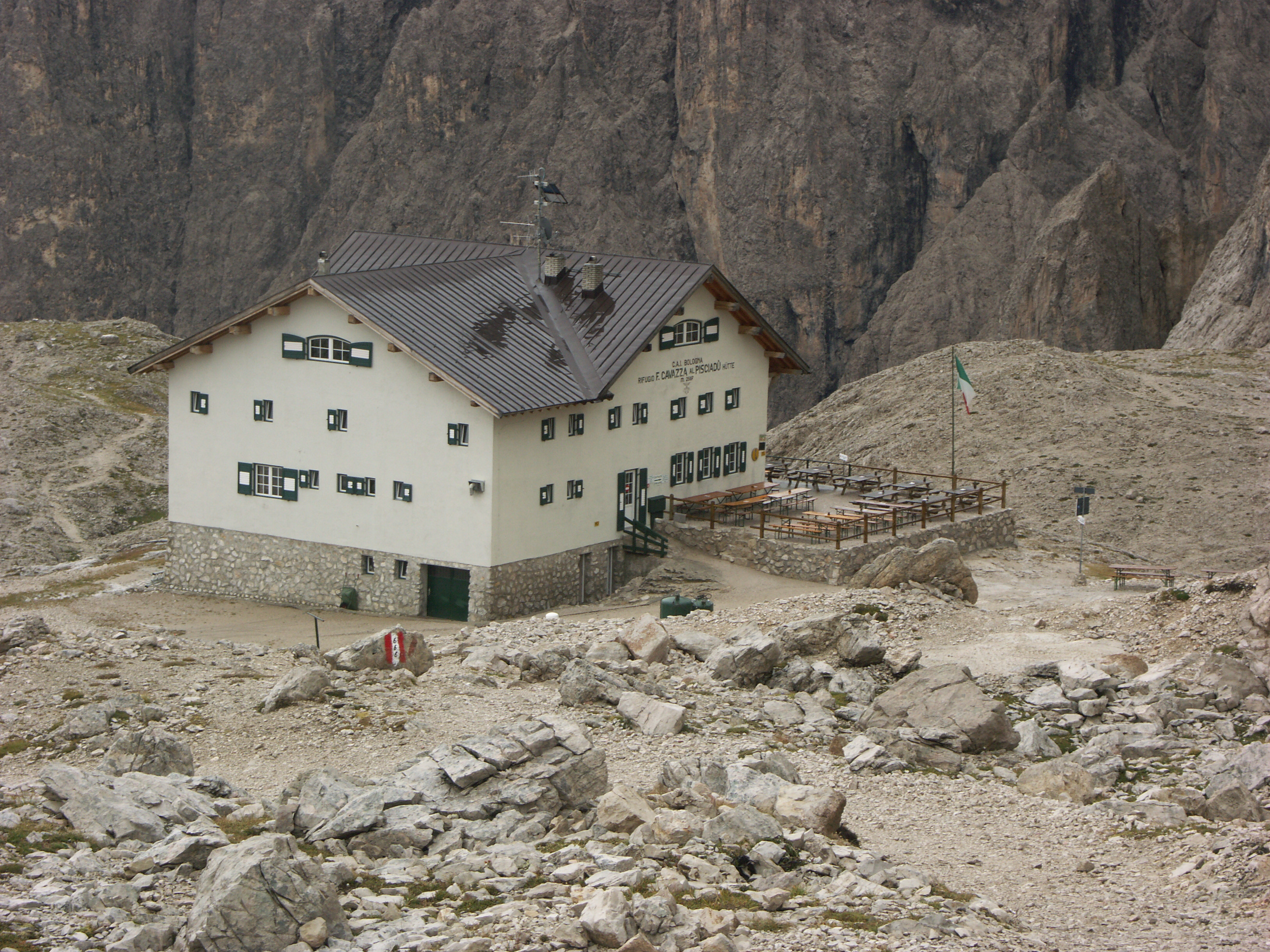 Bildautor: Rüdiger Kratz, St. Ingbert, bei Nennung des Bildautors "gemeinfrei" Aufnahmeort: Italien, Südtirol, Sella-Gruppe Pisciadù-Hütte, 2.587 m Ital.: Rifugio F. Cavazza al Pisciadù Aufnahmedaturm: August 2005